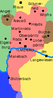 Das Amt Ilmenau in Thüringen. Es bestand von 1661 bis 1920. Rot sind die Gebiete Sachsen-Weimar-Eisenachs, gelb die von Schwarzburg-Sondershausen, grün Sachsen-Coburg und Gotha, braun Schwarzburg-Rudolstadt, dunkelblau Preußen, hellblau Sachsen-Meiningen. (Maßstab: 1 : 100.000)